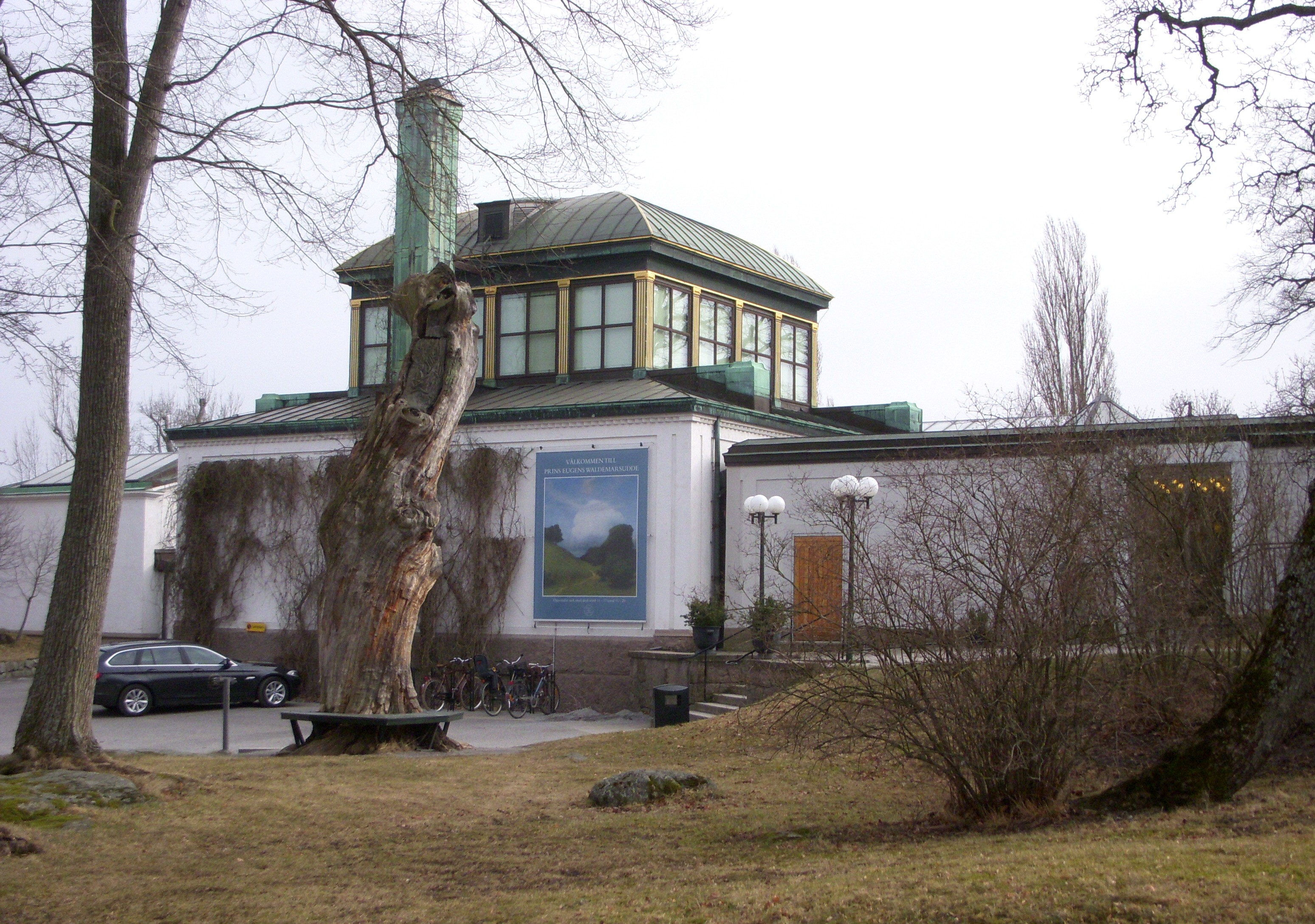 Waldemarsuddes Galleribyggnad